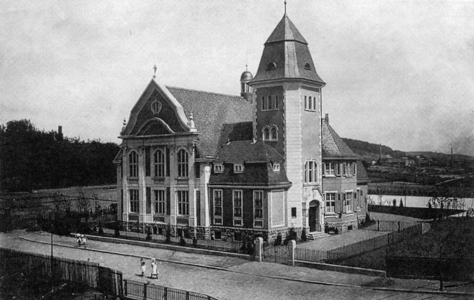 Lutherisches Gemeindehaus am Engelnberg unmittelbar nach der Erbauung